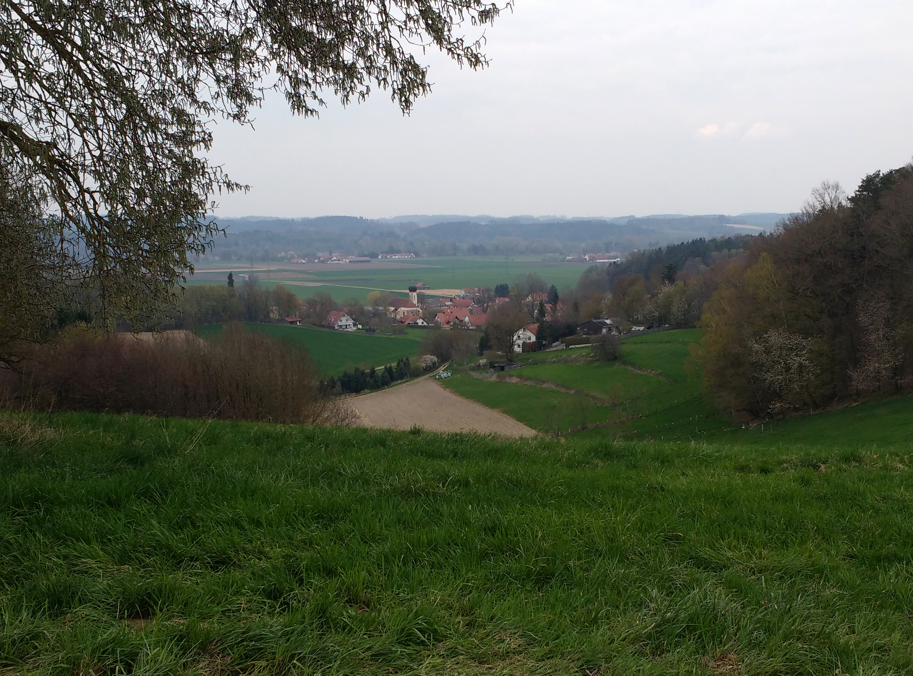 Der Freisinger Ortsteil Haindlfing